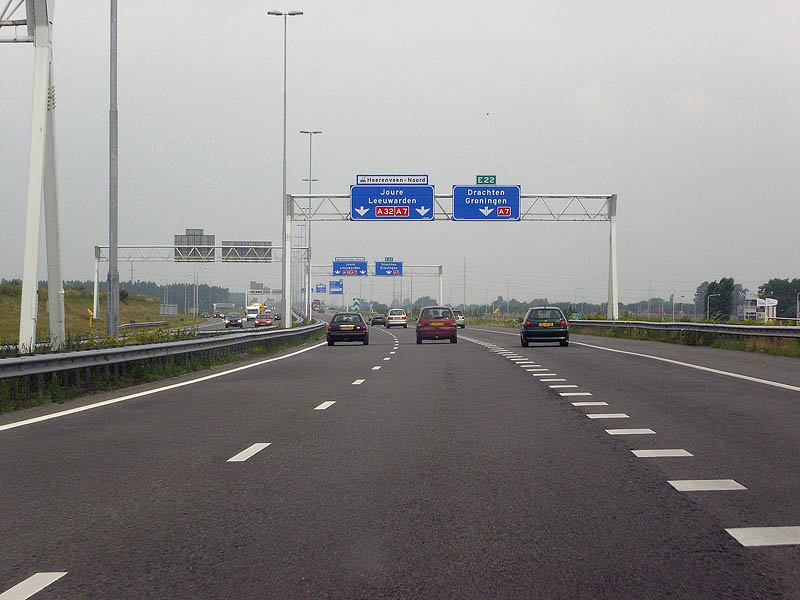 A32 richting Leeuwarden, ter hoogte van knooppunt Heerenveen.